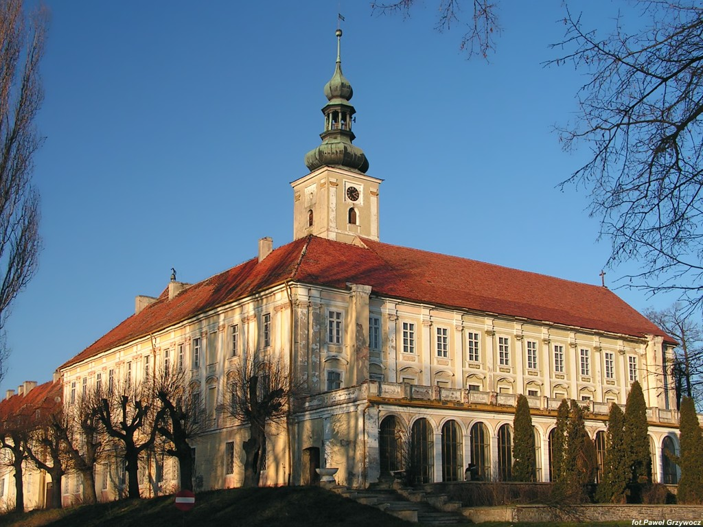 Dawna komandoria Templariuszy w Oleśnicy Małej (woj. dolnośląskie, gmina Oława).